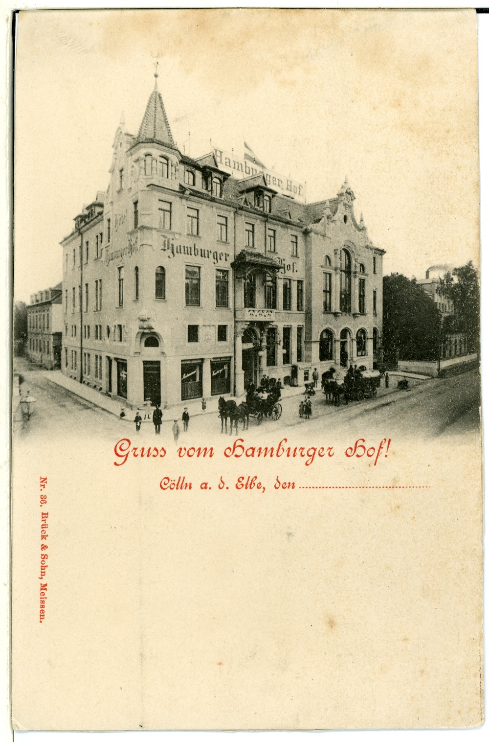 Meißen; Hamburger Hof This postcard is from publisher Brück & Sohn in Meißen ( postcard has a unique number 00036 and is available in a higher resolution at the publisher. This images was uploaded in a cooperation project between Wikipedians and the publisher.